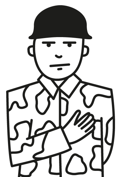 Æresord (fr. parole d'honneur) er en forsikring gitt med ens ære i pant om å holde et løfte.